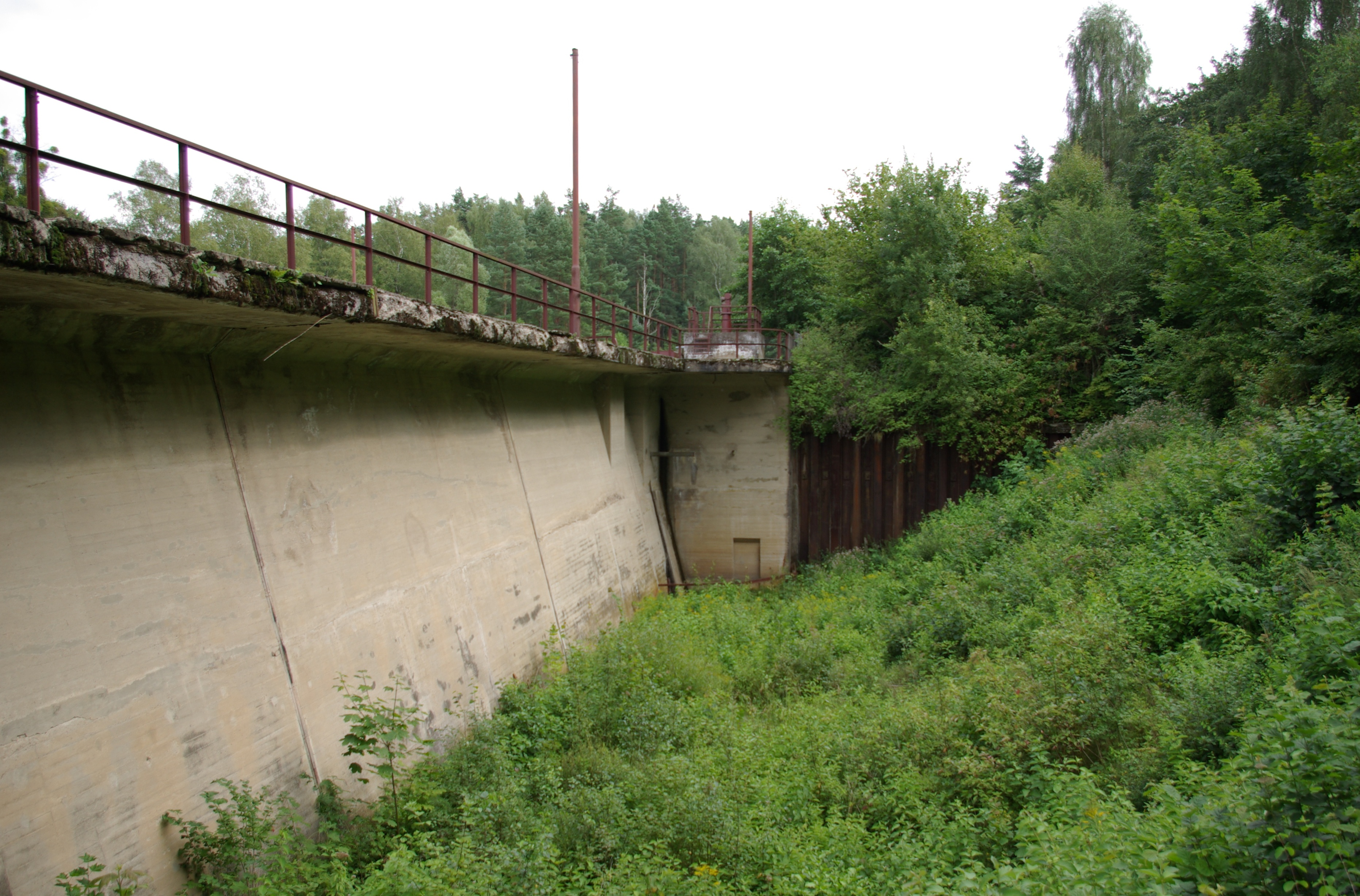 Kanał Mazurski, Śluza Piaski (Guja)